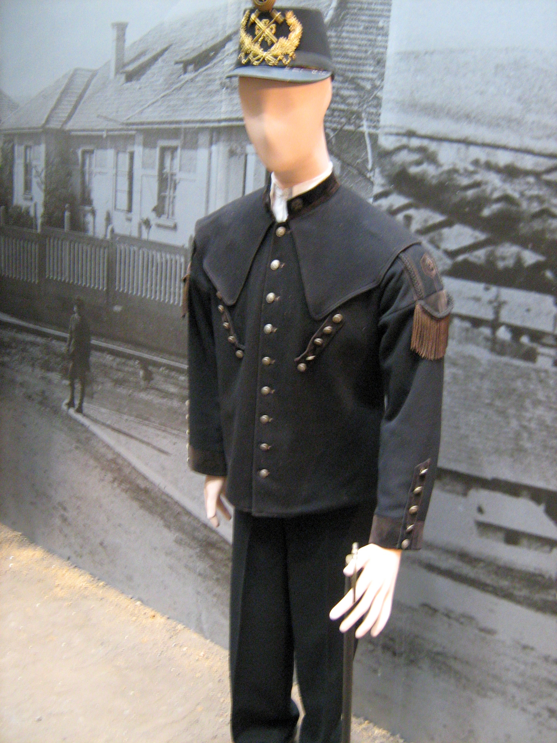 Bányászegyenruha (Tatabányai Múzeum). A múzeum jelenlegi helyére, A Vértes Agorájába (a régi Közművelődés Házába) 1985-ben költözött. - A régi XV-ös akna, skanzen avagy a Szabadtéri Bányászati Múzeum (Vágóhíd utca) szintén a Tatabányai Múzeum része